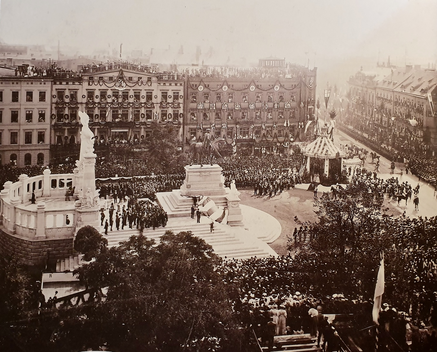 Odłsonięcie pomnika cesarza Wilhelma I we Wrocławiu w 1896